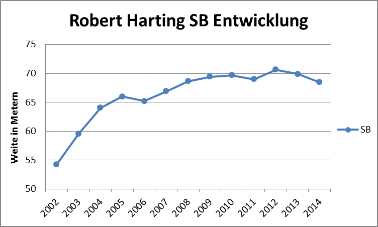 Entwicklung der Saisonbestleistung von Robert harting